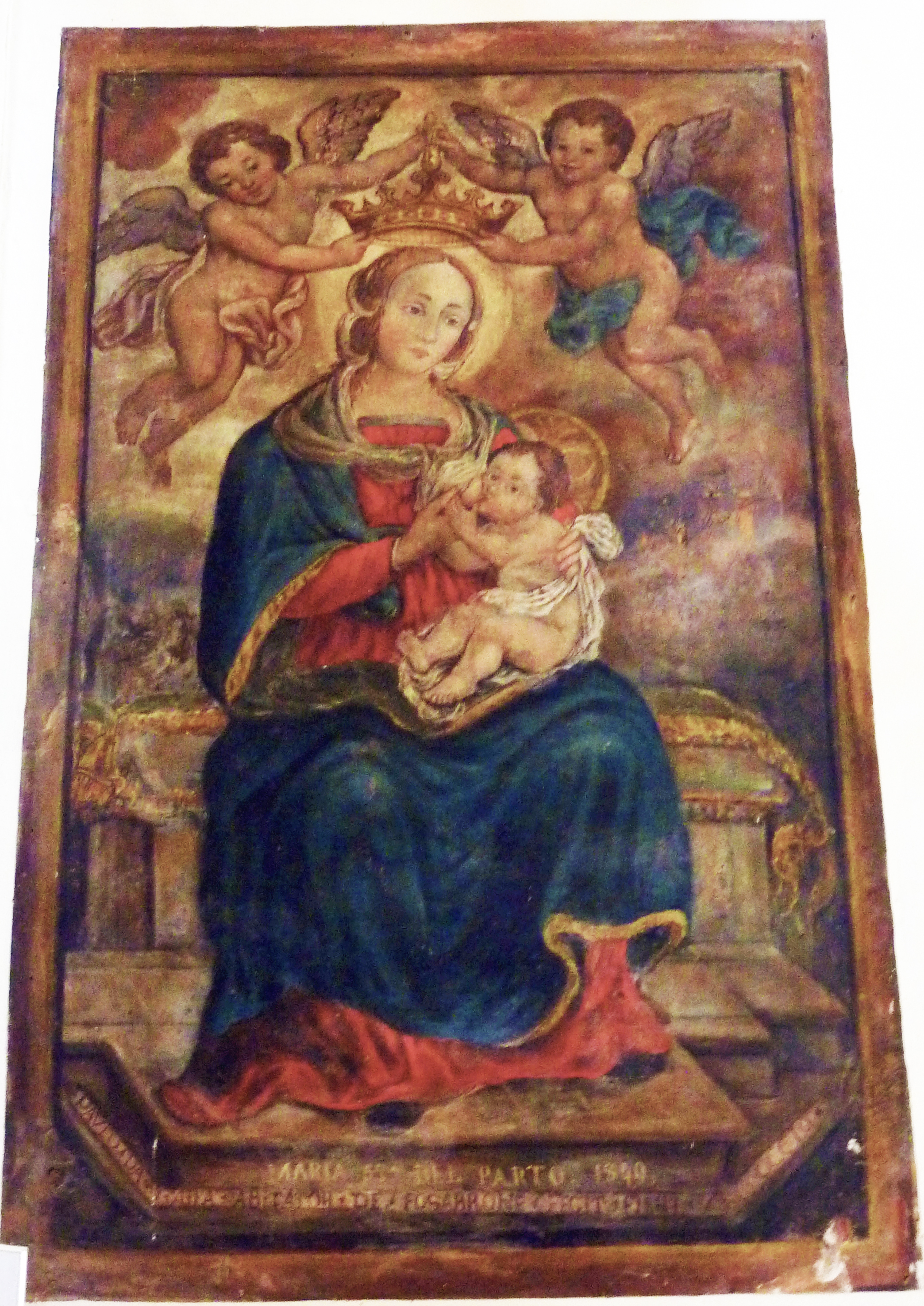 Madonna del parto, interno della Chiesa di Santa Maria Novella di Orciano di Pesaro